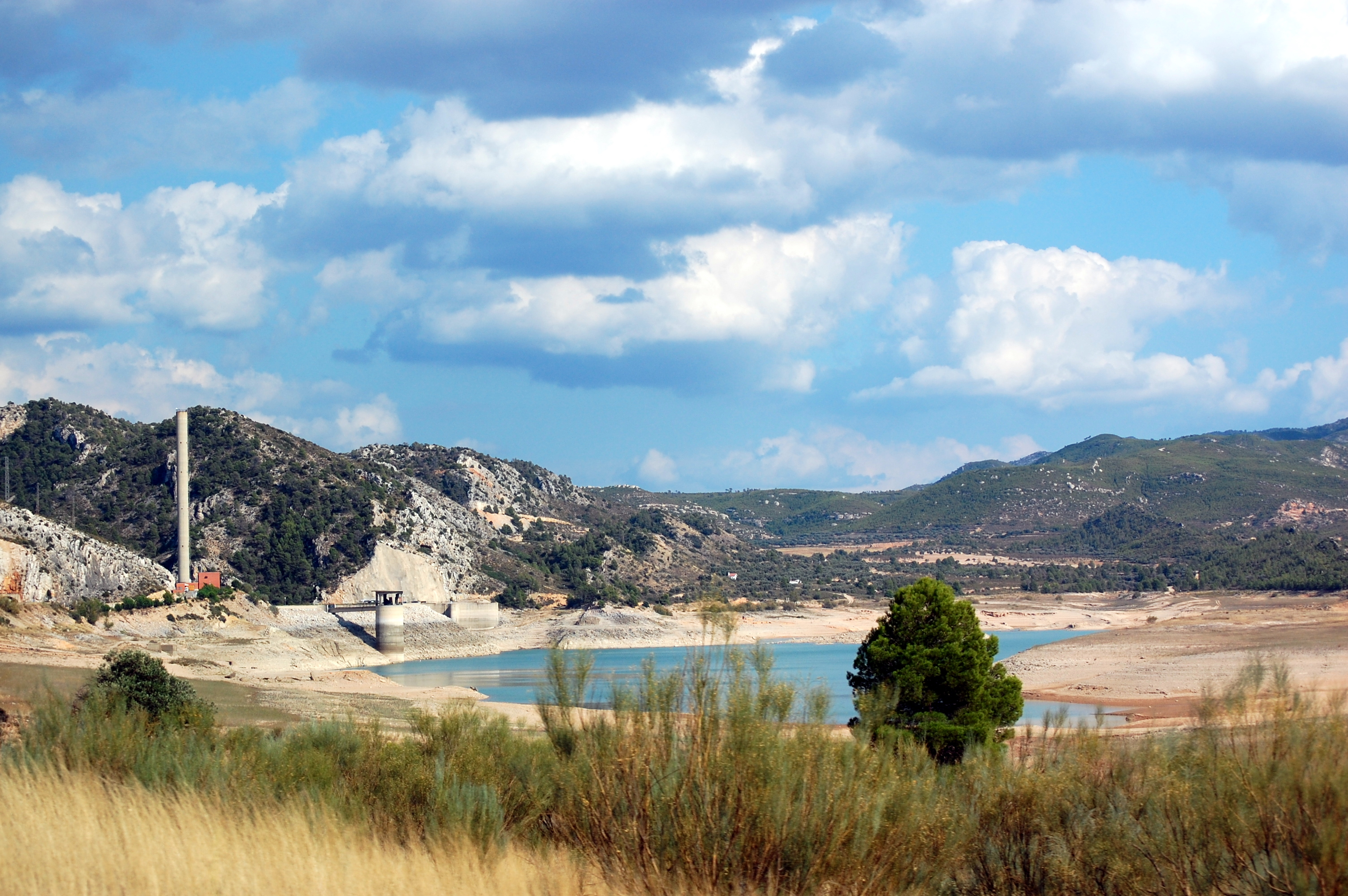 Embalse de Calanda.